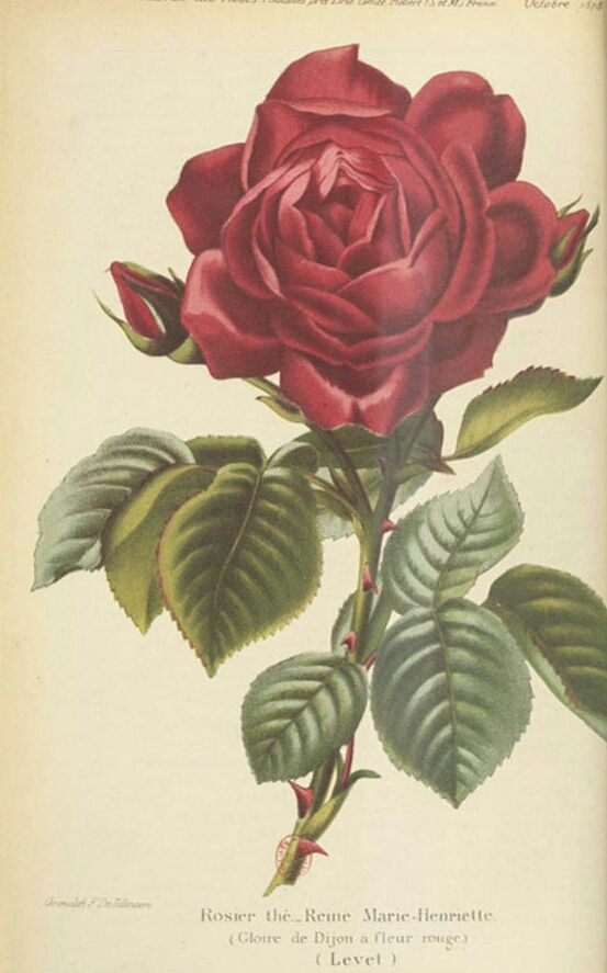 Rose thé 'Reine Marie-Henriette' (Levet 1878), illustration parue dans le Journal des roses d'octobre 1878.